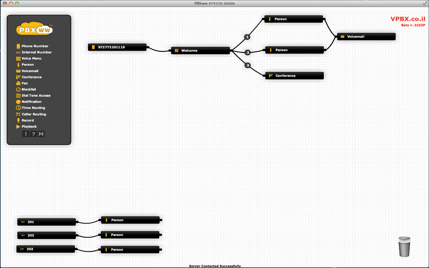 פאנל ניהול של מרכזייה וירטואלית